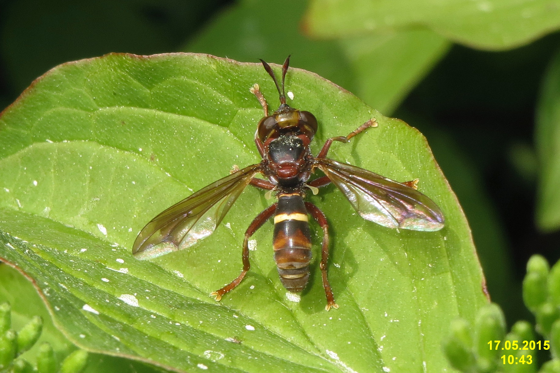 Conops vesicularis - očnatka hnědá.